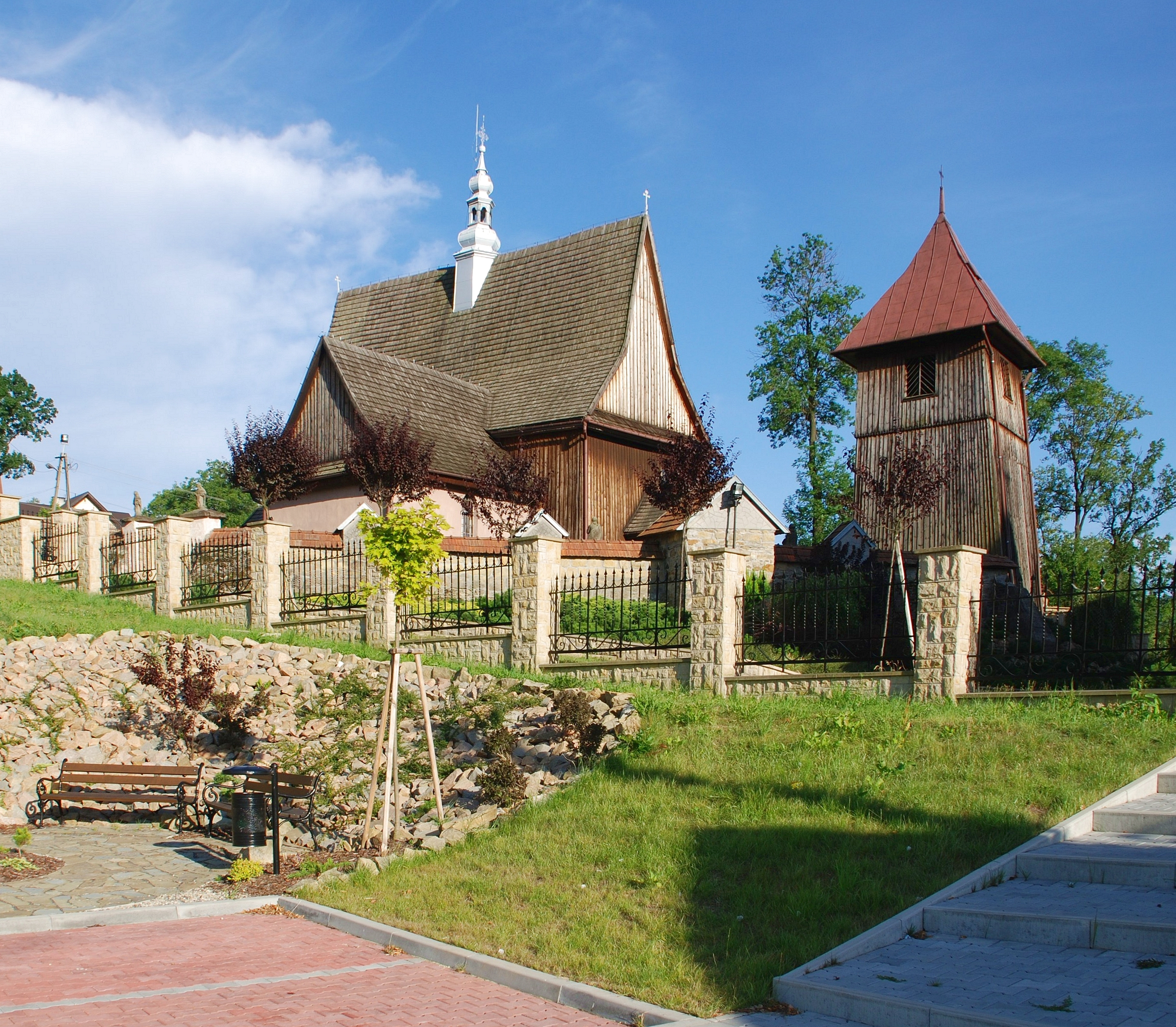 wieś Rajbrot